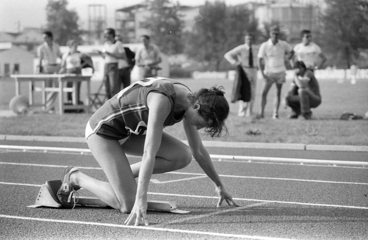 Giuseppina Cirulli sul blocco di partenza il 4 agosto 1978.